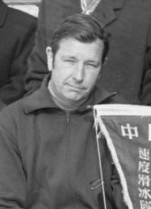 Training wereldkampioenschappen schaatsen dames in Heerenveen: Amerikaanse trainer John Werket met Chinese schaatsploeg.